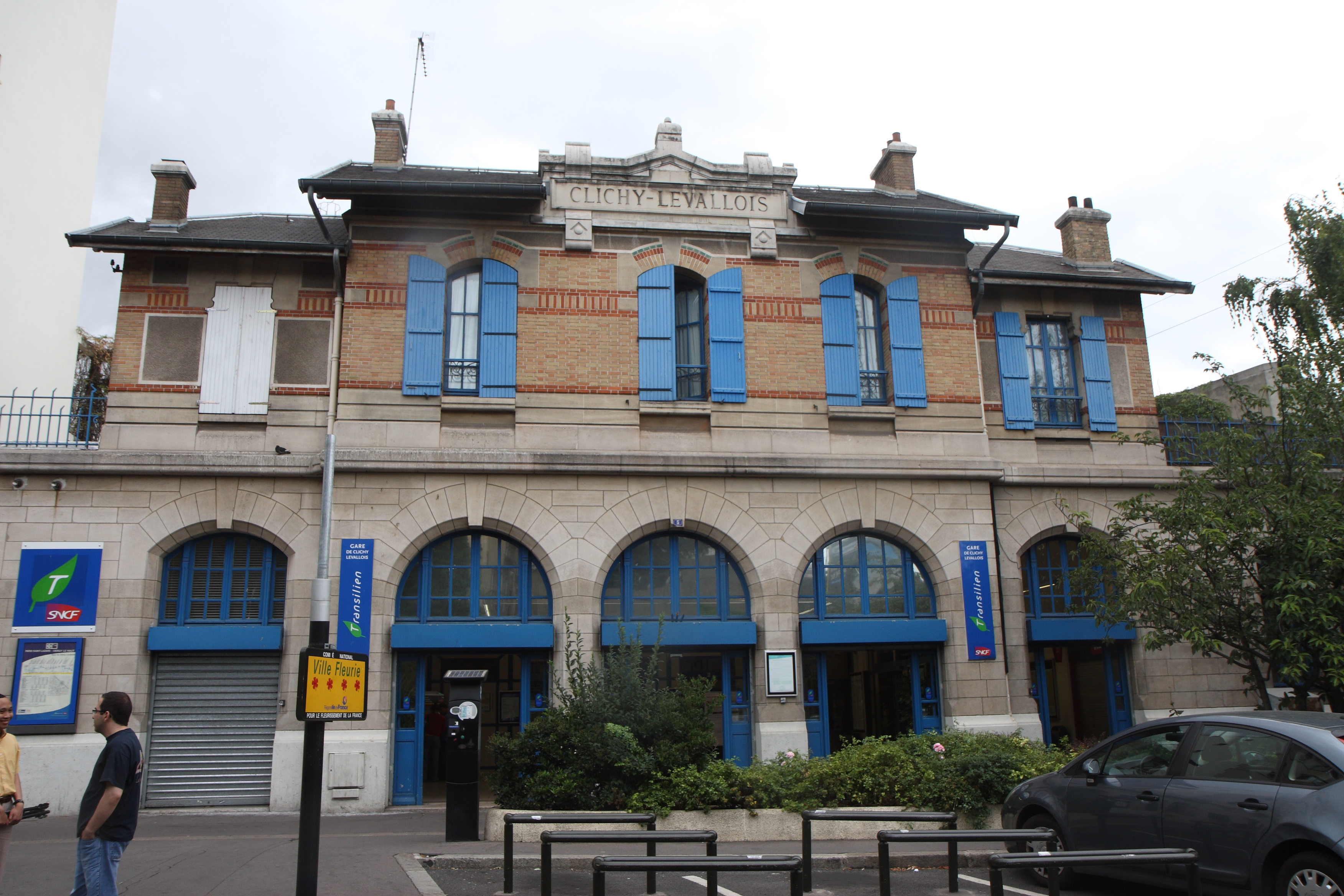 Gare SNCF de Clichy Levallois